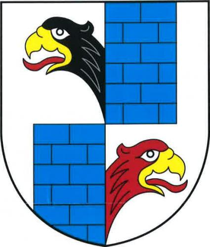 znak, Chřenovice, okres Havlíčkův Brod